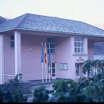 Ayuntamiento del Concejo de Degaña, Asturias (España).